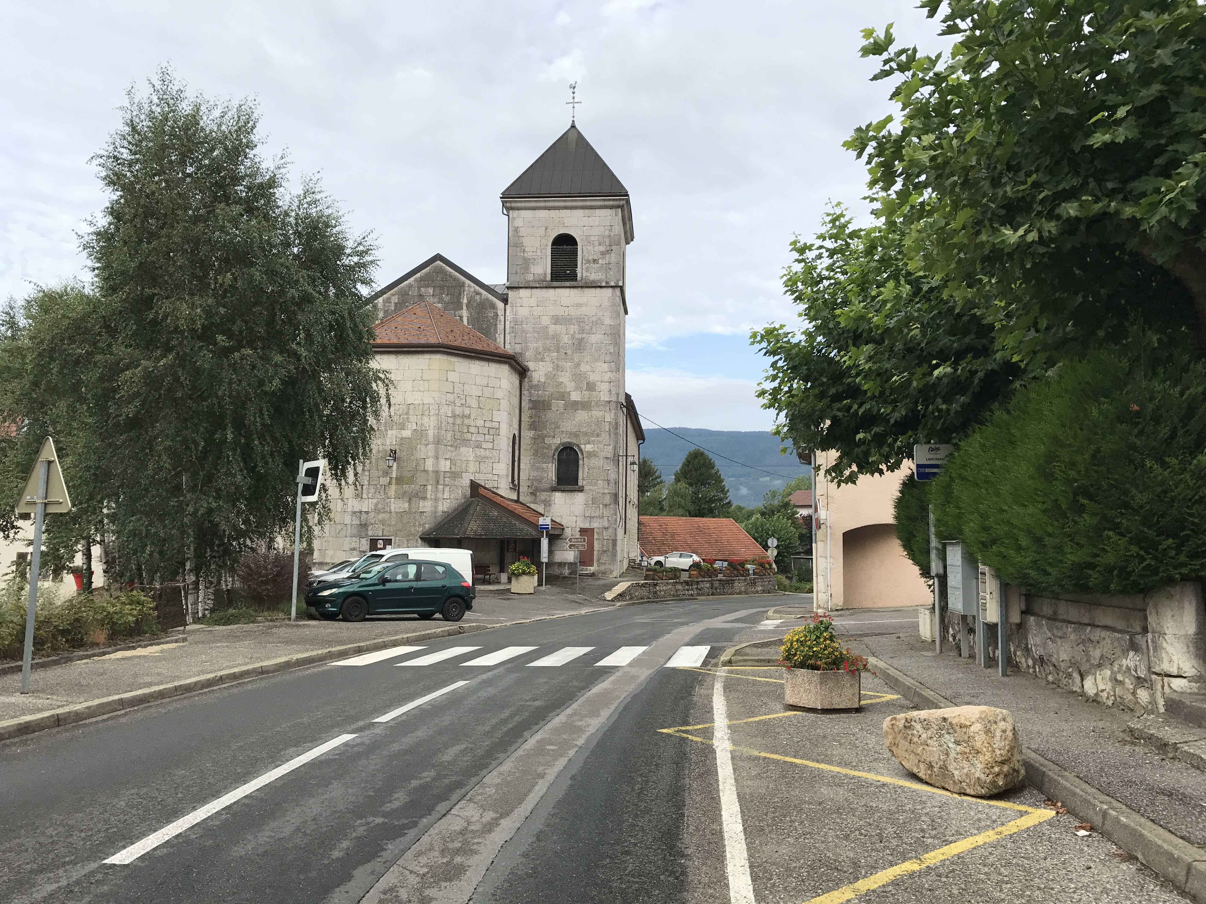 Images de Lancrans, Ain, France.